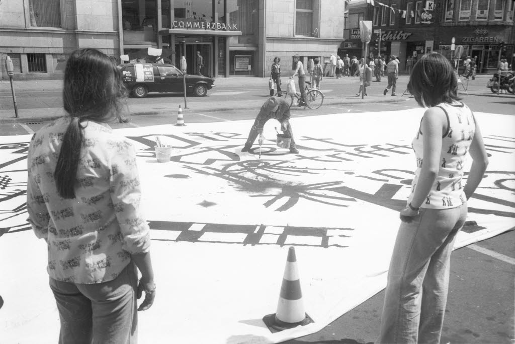 Der Künstler Arnold Daidalos Wande (Bildmitte) malt auf dem abgesperrten Parkplatz vor dem Verlagsgebäude der Kieler Nachrichten (KN) in der Fleethörn ein Riesengemälde auf einer ca. 200 qm großen Leinwand.